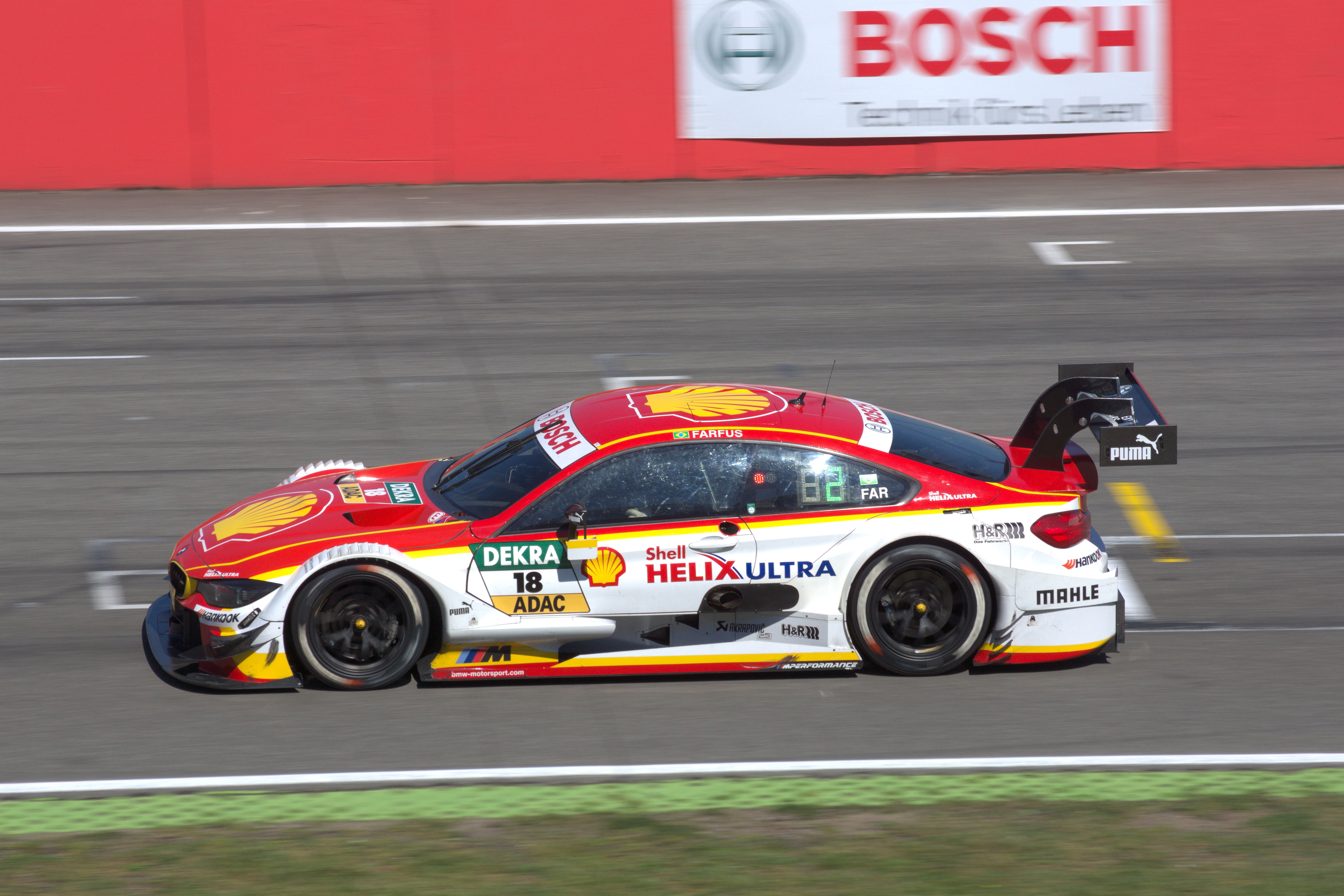 DTM. 08.05.2016 in Hockenheim. Race 2